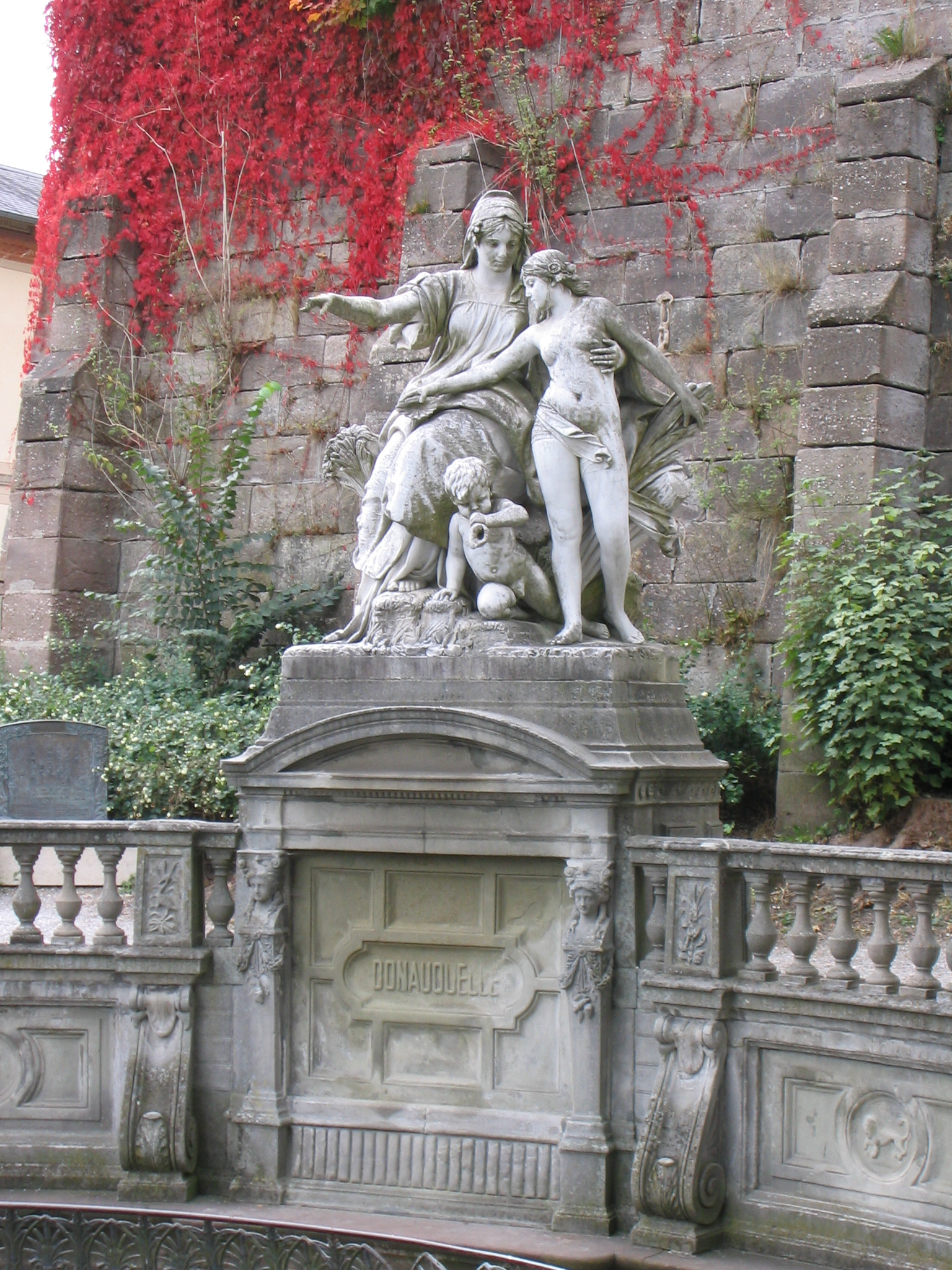 Donauquelle in Donaueschingen